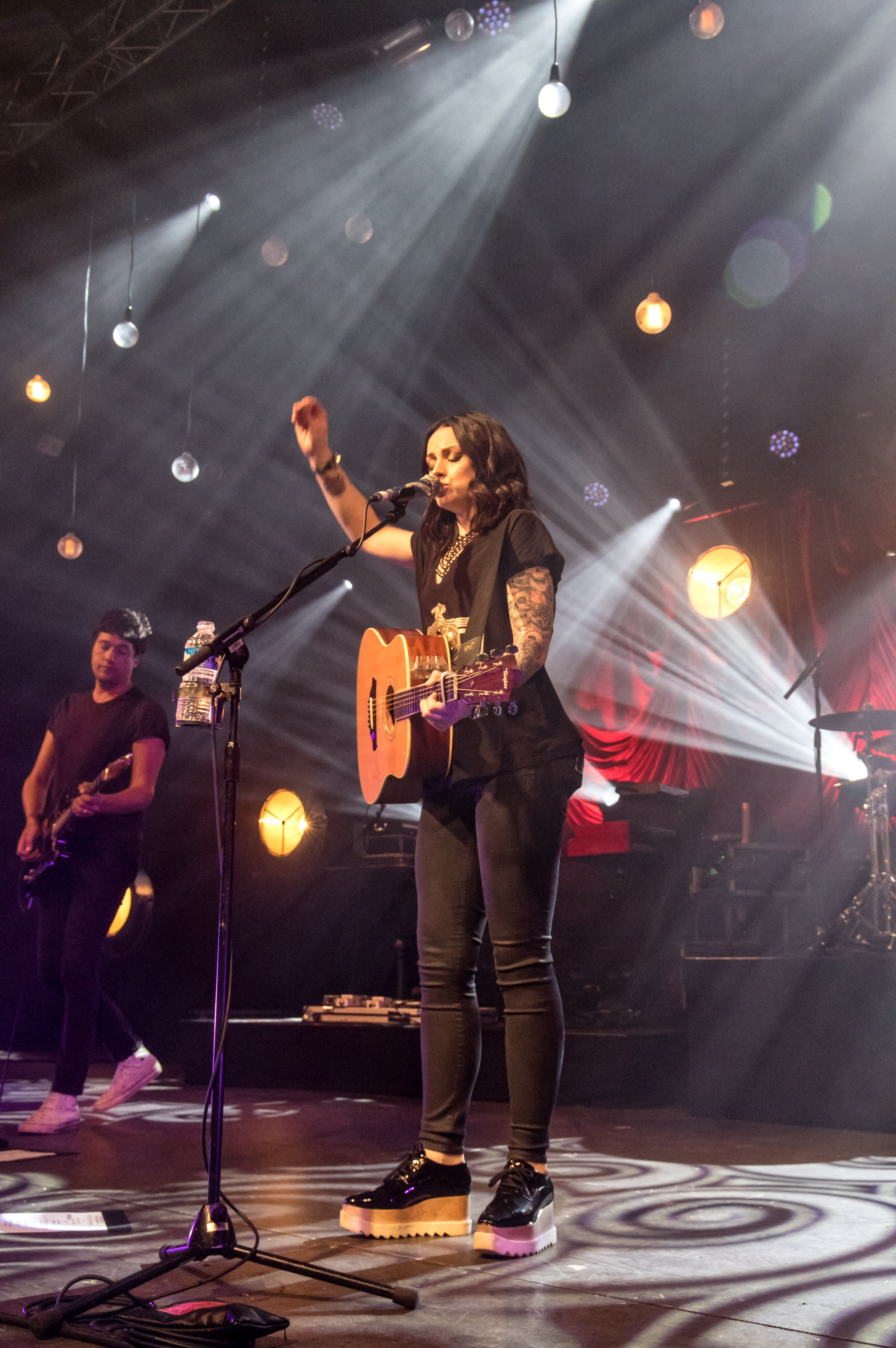 Bilder vom Zelt Musik Festival 2017 in Freiburg im Breisgau